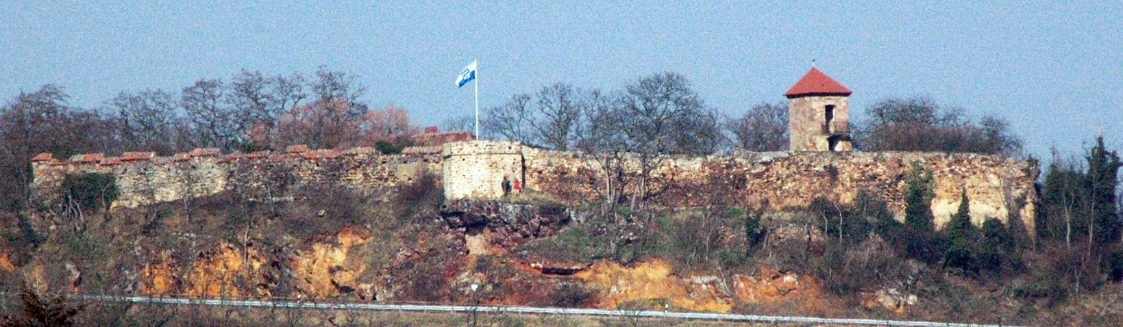 Burg Battenberg von Norden.